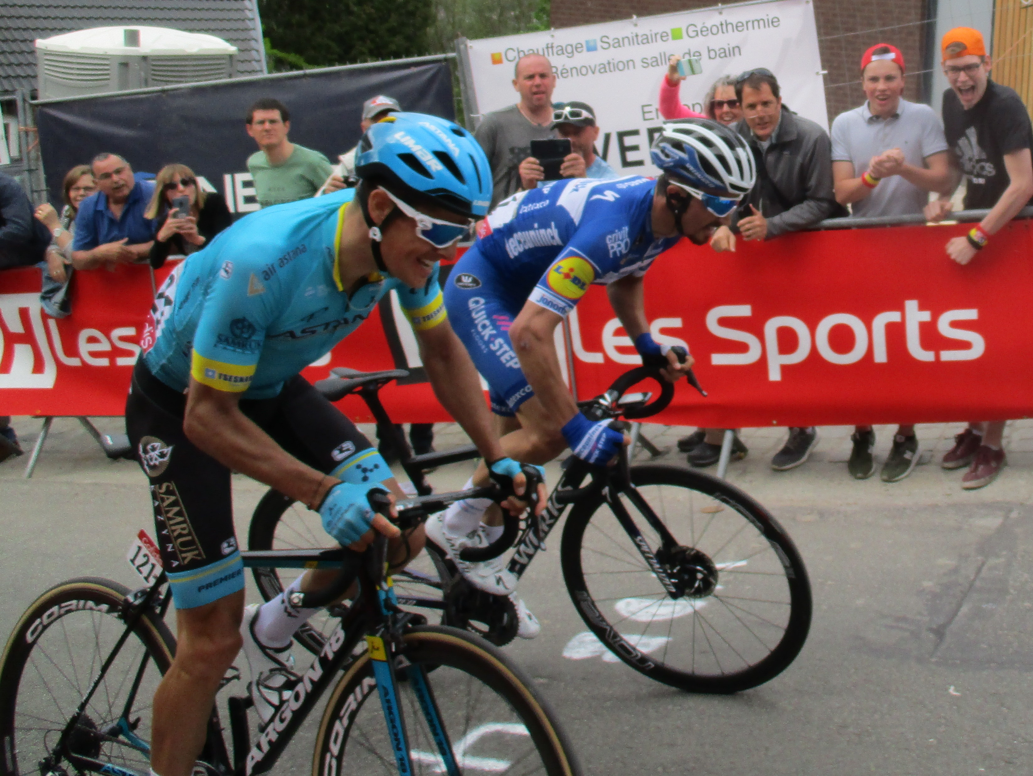 Laatste passage van de Waalse Pijl 2019 voor mannen op de Mur de Huy: sprint tussen Fuglsang en Alaphilippe (winnaar)